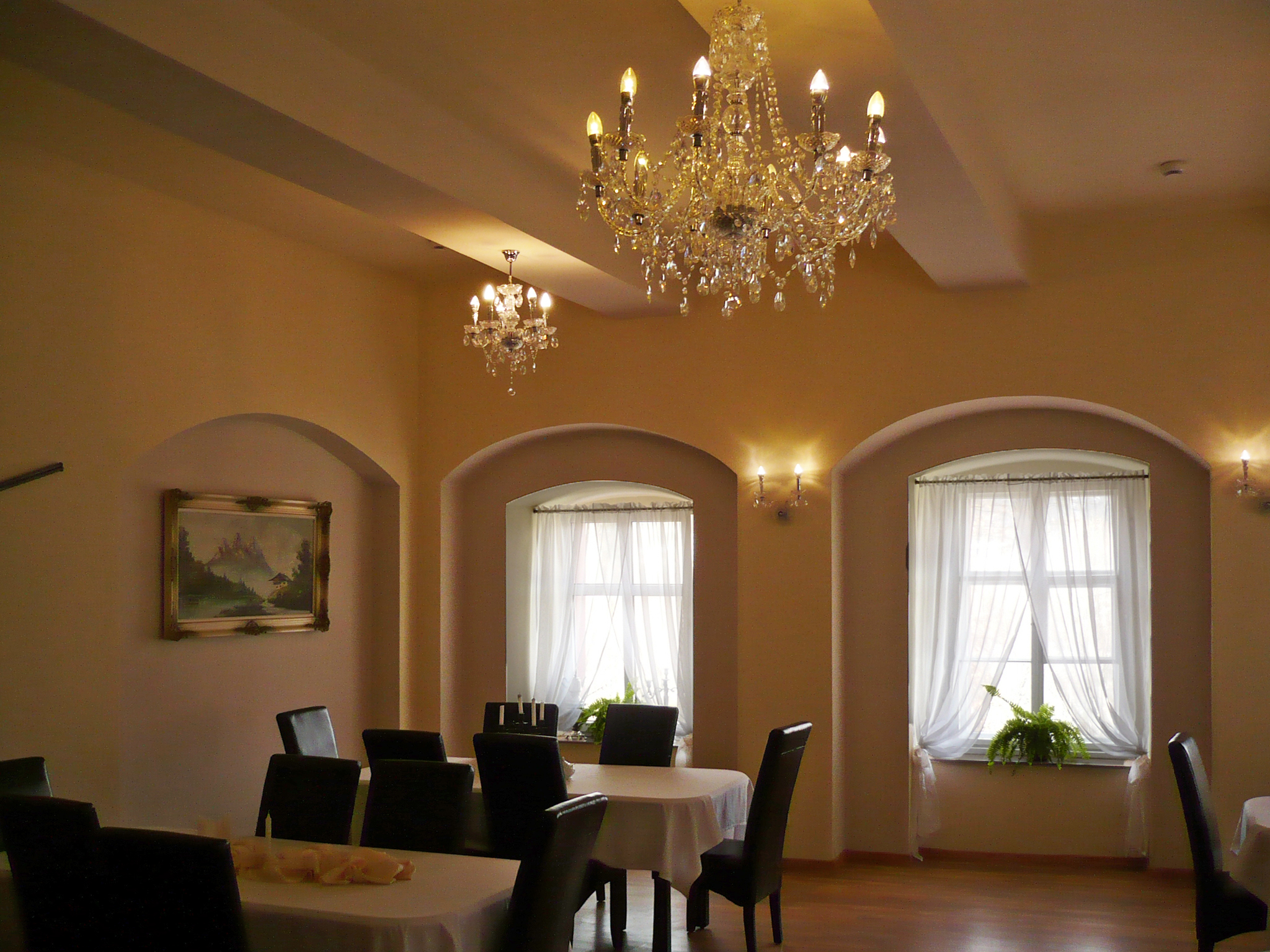 Nowa Ruda, ul. Kościelna 30 - Dwór Górny, obecnie hotel, XVII, XIX w. (zabytek nr A/940/652/WŁ z 25.05.1977)